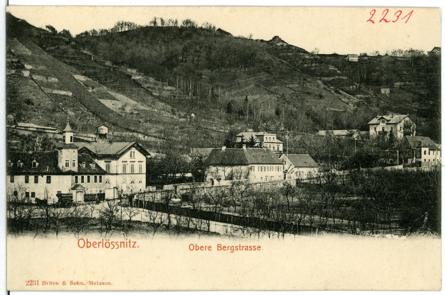 Oberlößnitz; Obere Bergstraße This postcard is from publisher Brück & Sohn in Meißen ( postcard has a unique number 02231 and is available in a higher resolution at the publisher. This images was uploaded in a cooperation project between Wikipedians and the publisher.